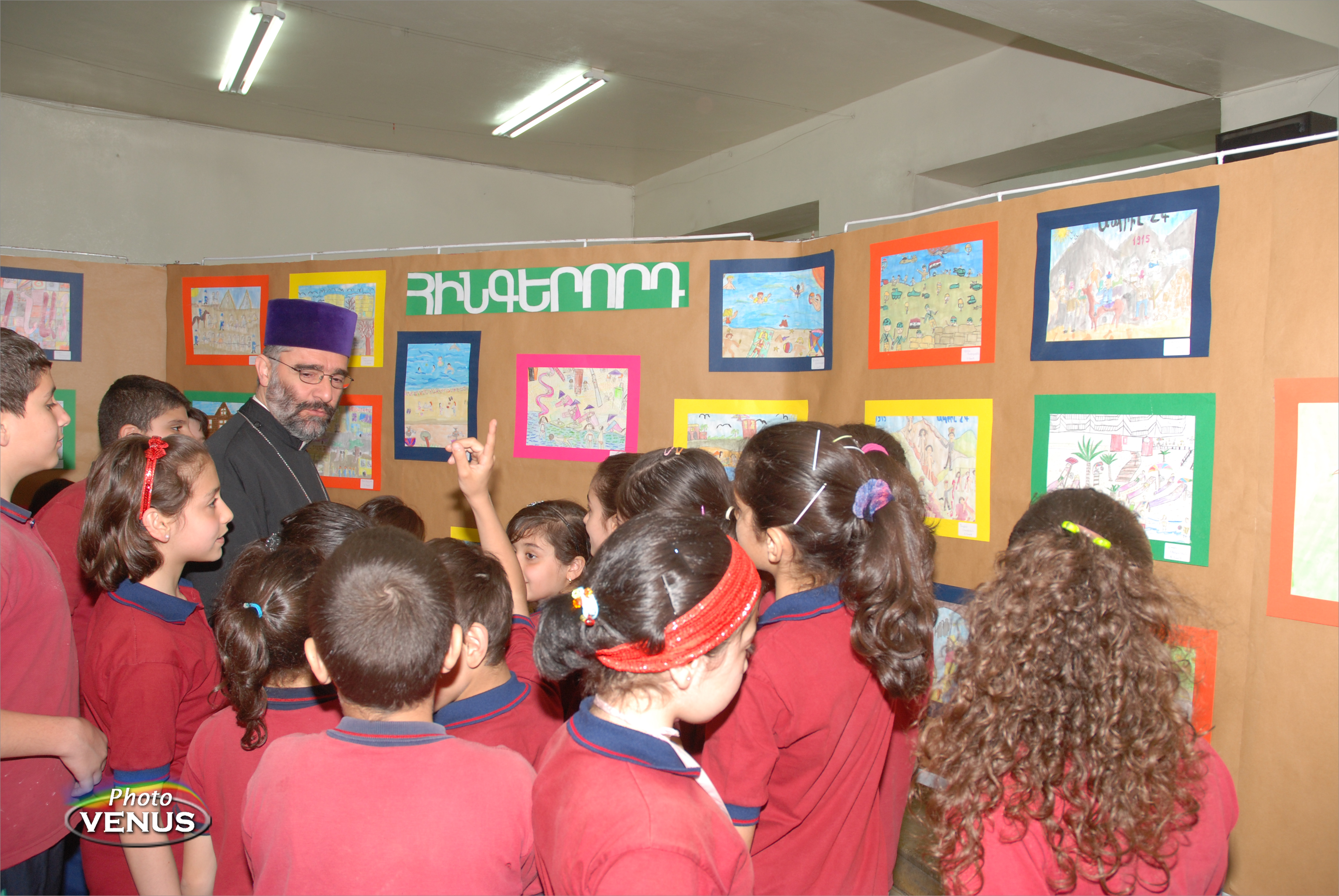 տարեկան աշխատանքներու ցուցահանդէս